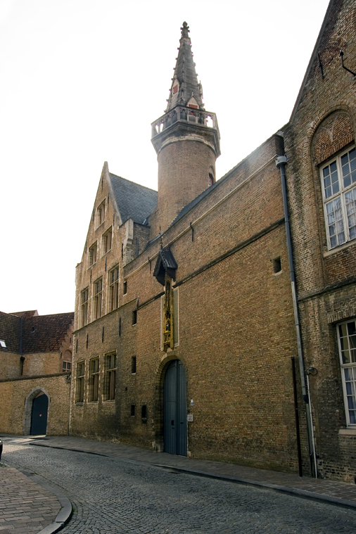 Hof Bladelin, Brugge